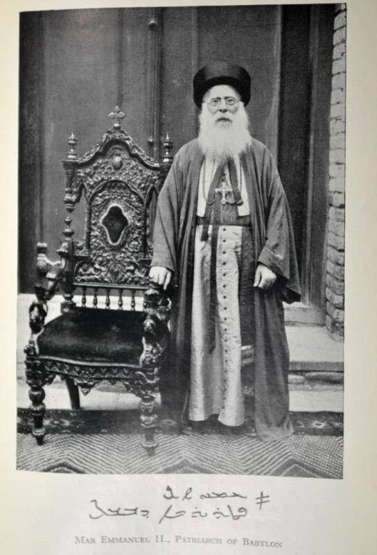 Mar Emmanuel II, patriarche chaldéen de Babylone (de 1900 à sa mort en 1946), en 1925.